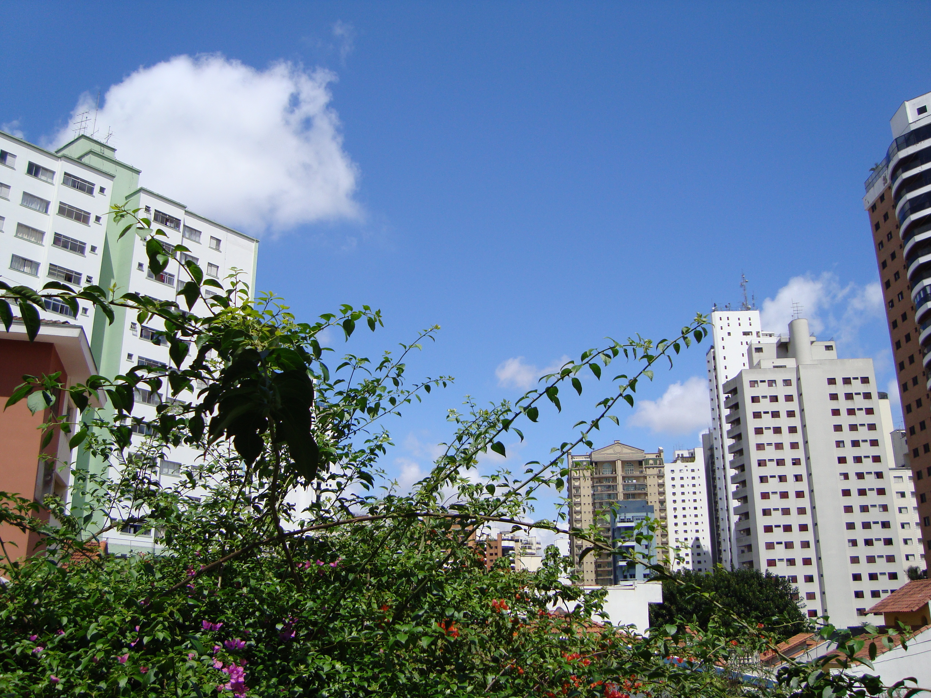 Foto do Bairro Alto de Santana São Paulo/SP